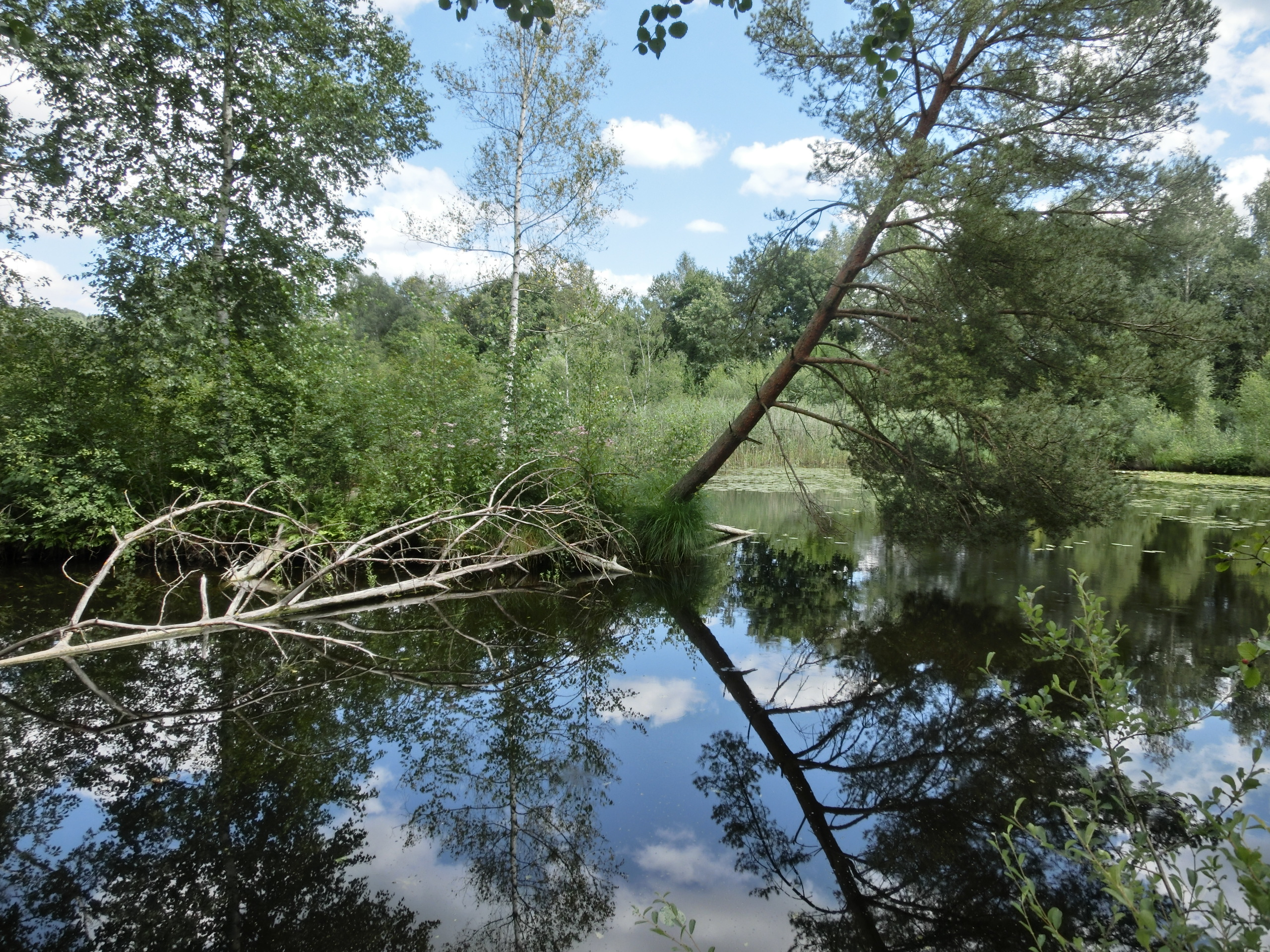 Deutschland - Baden-Württemberg - Landkreis Sigmaringen: Pfrunger-Burgweiler-Ried, am Moorlehrpfad 003